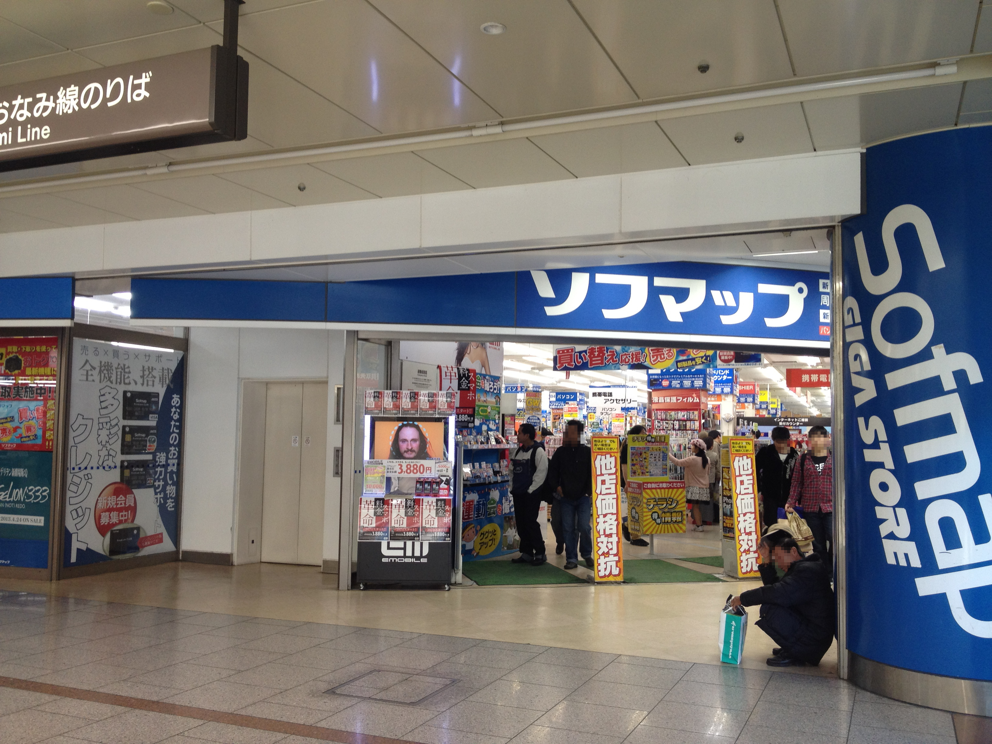 ソフマップ名古屋駅ナカ店